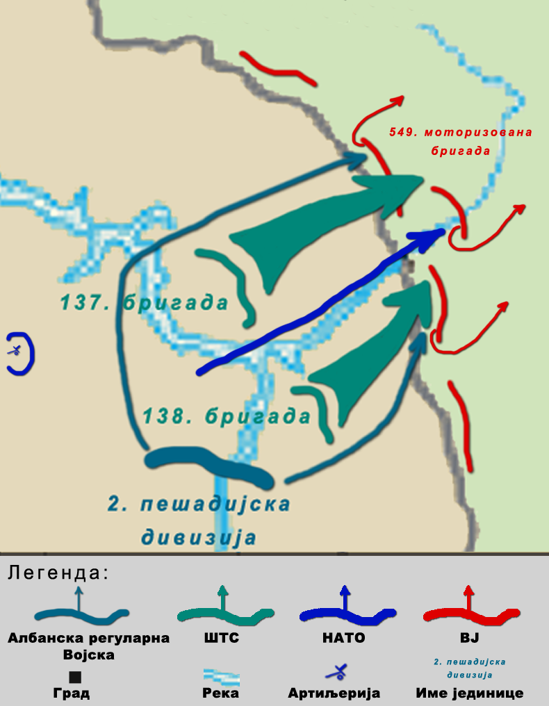 План операције Стрела. Основна замисао је да кроз ваздушно копнену битку елементи шиптарских терористичких снага и регуларне војске Р.Албаније изврши продор на Паштрик, разбије и одбаци снаге ВЈ и самим тим дозволи снагама НАТО-а продори јаким снагама у Метохију.